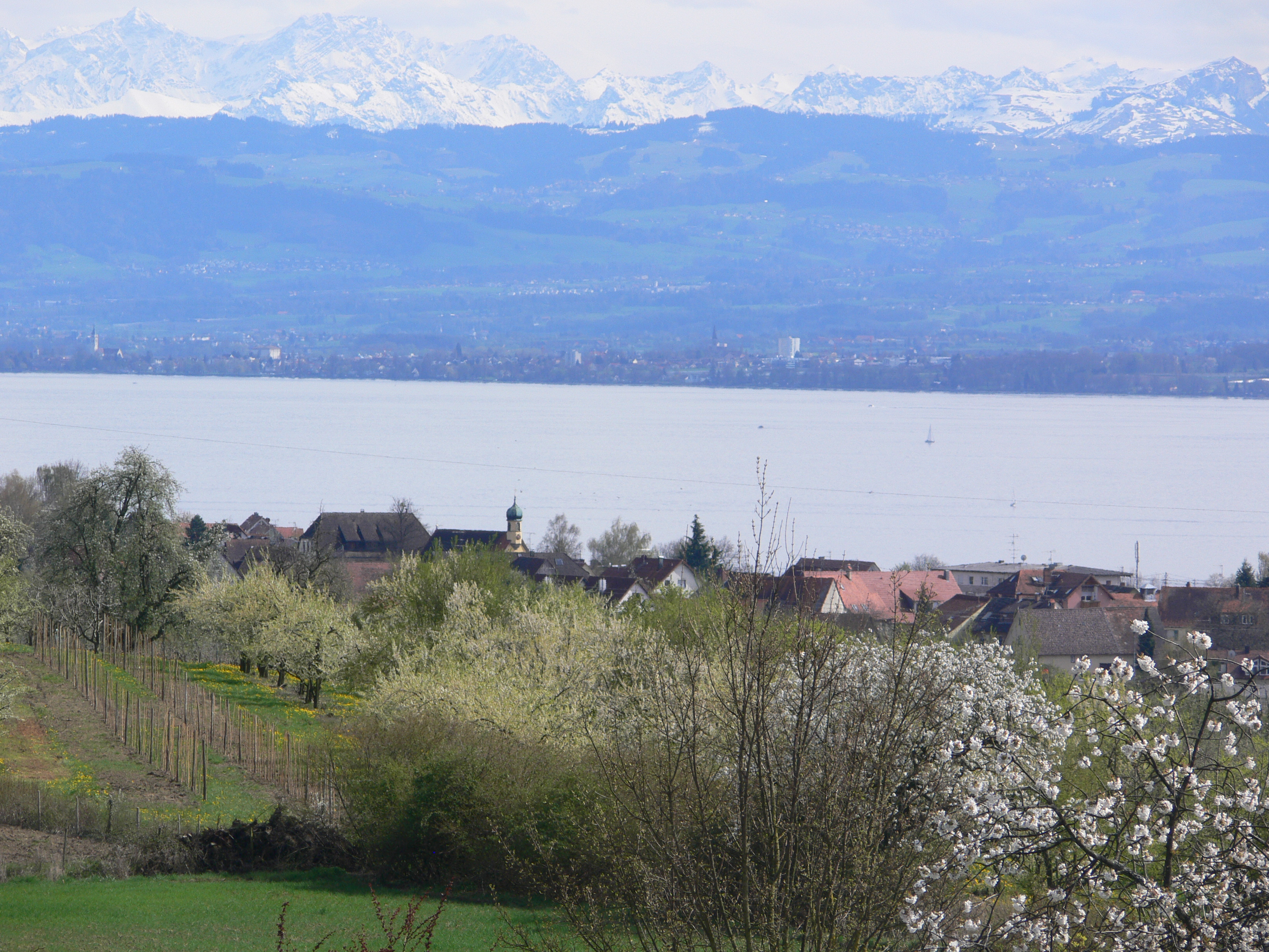 Blick über Stetten (Bodenseekreis) und den Bodensee auf die Alpen